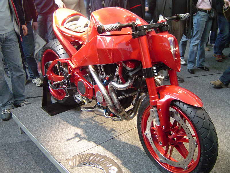 HBM Hellbender